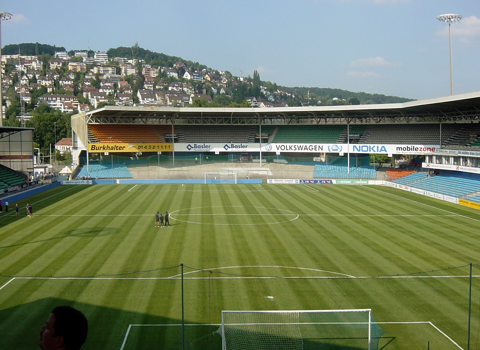 Hardturm Stadium, Zürich